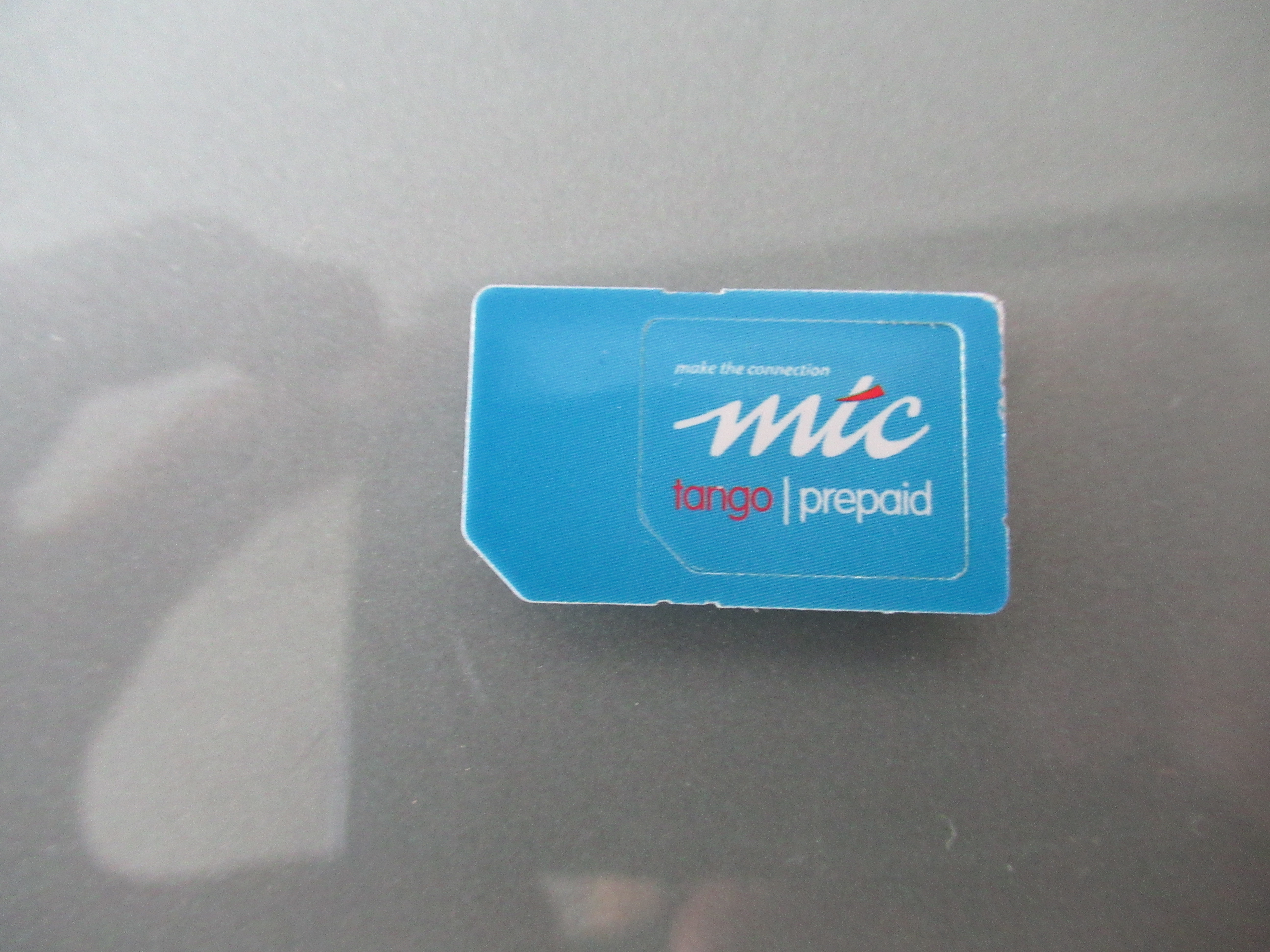 mtc Namibia tango prepaid Karte gekauft am 8.Oktober 2016